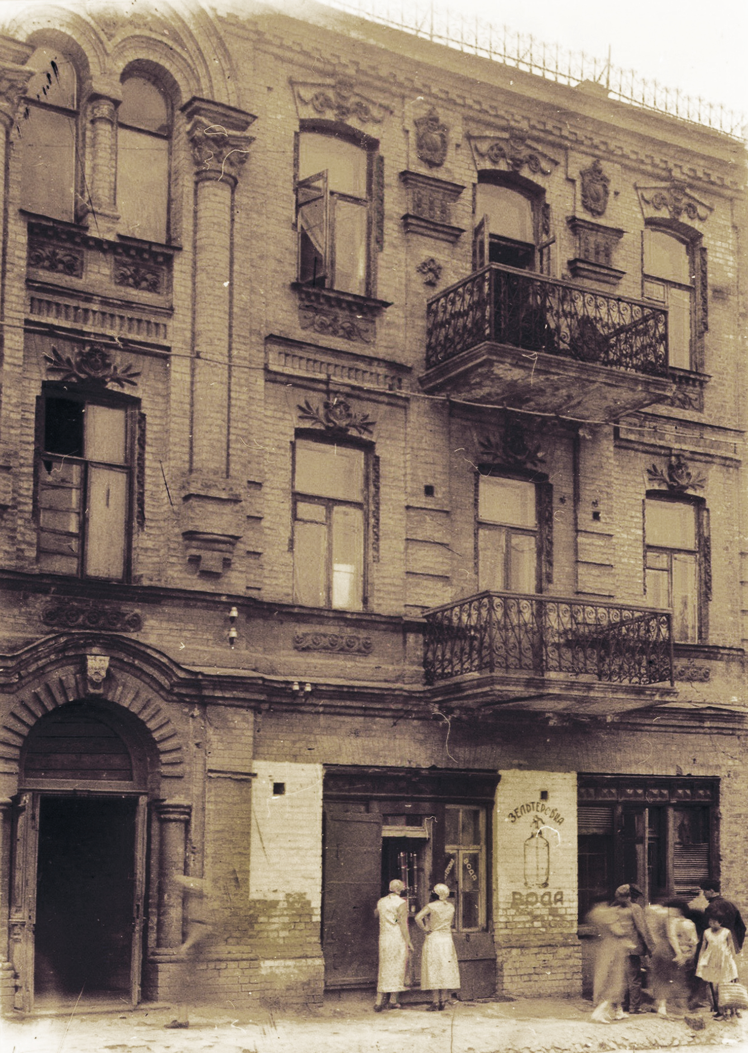 Будинок Вертипороха, Київ, Межигірська вул., 33/19. Фото 1934 року.